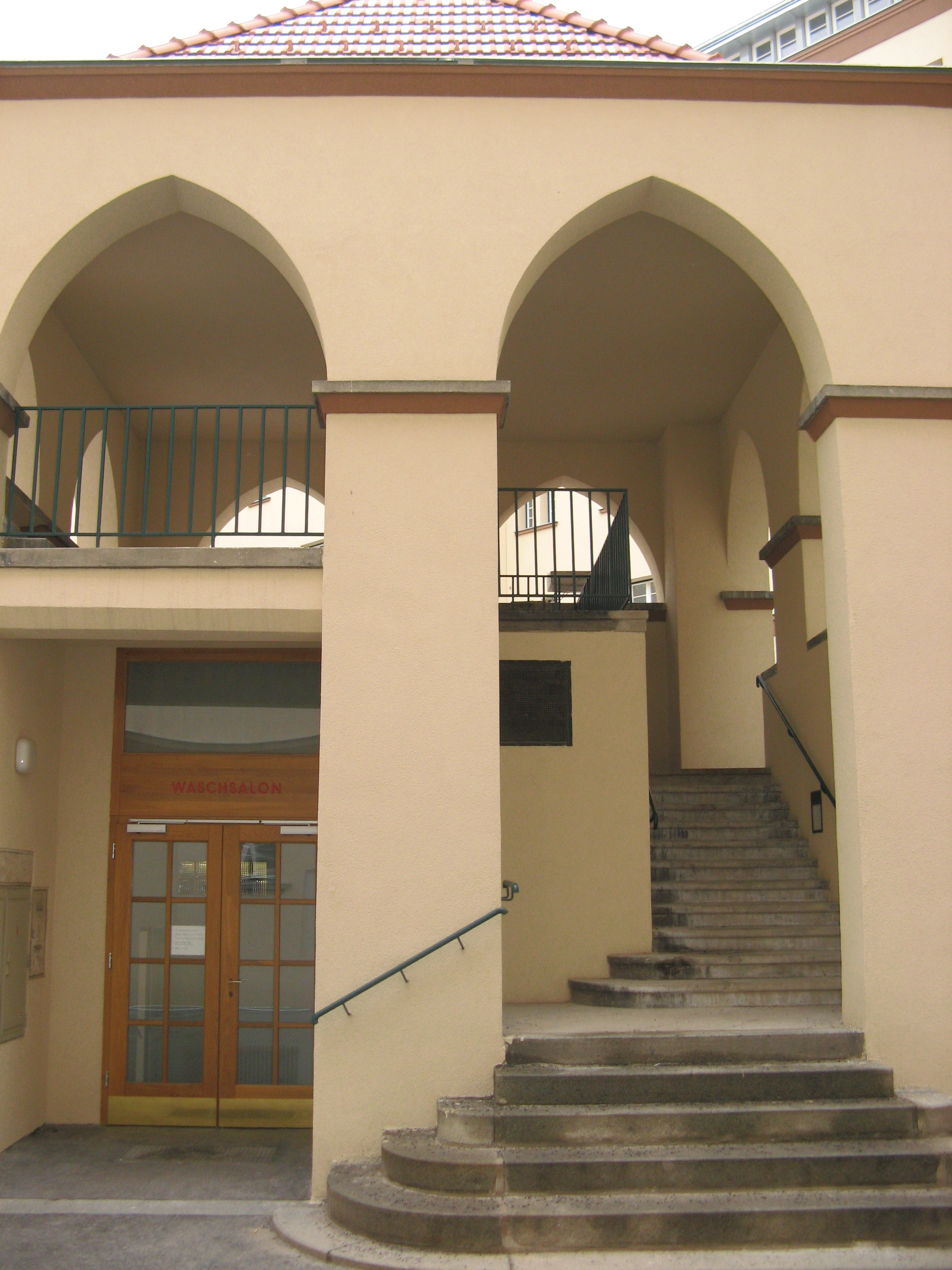 Wohnhausanlage Liebknechthof (1926/27) von Karl Krist in Wien-Meidling, Aufgang beim Waschsalon